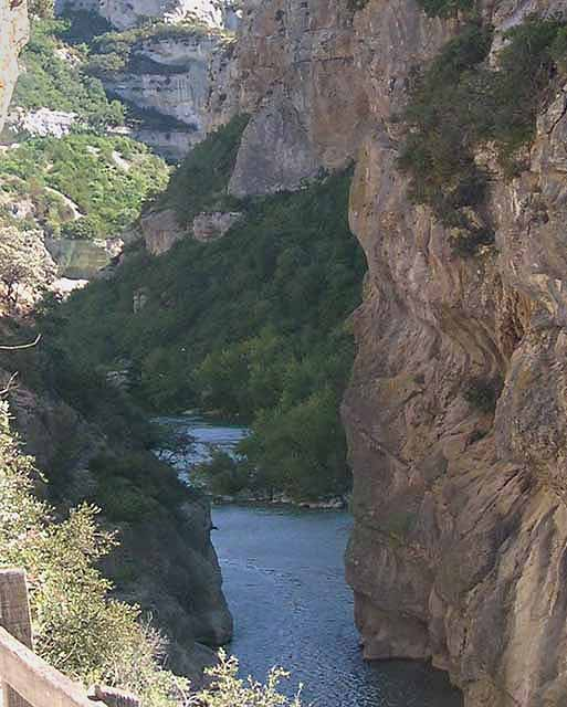 Vista de la Foz de Lumbier (Navarra)